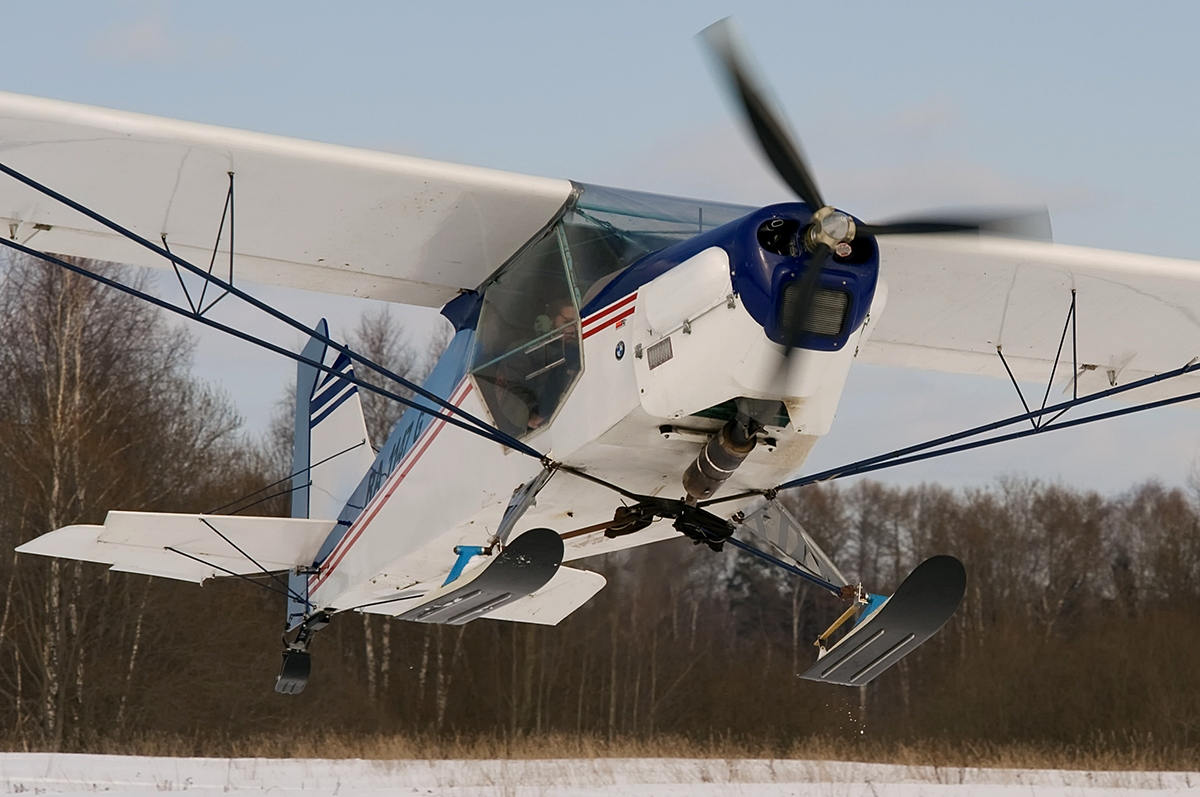 Flight! Highlander (KitFox). Just Aircraft Highlander